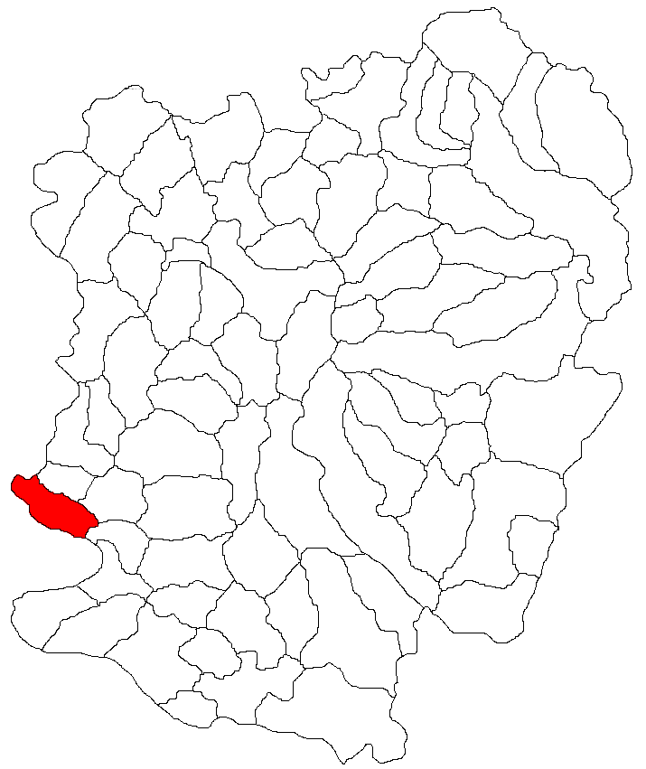 Categorie:Hărţi ale judeţului Caraş-Severin